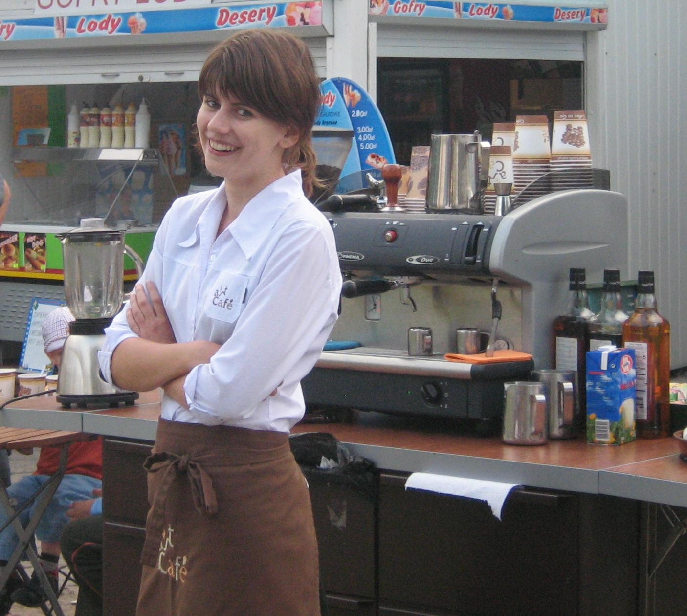 Współczesna kawiarka w Międzyzdrojach